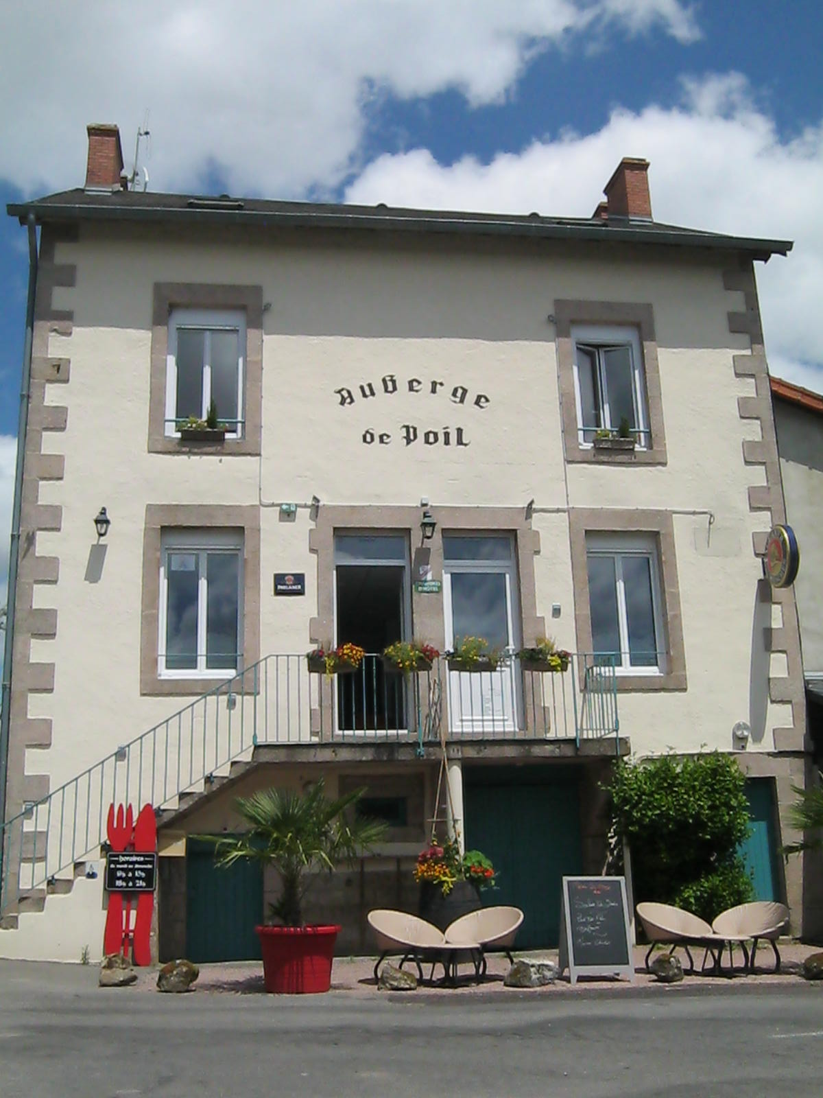 Façade de l'auberge de Poil (Bourgogne-Franche-Comté).